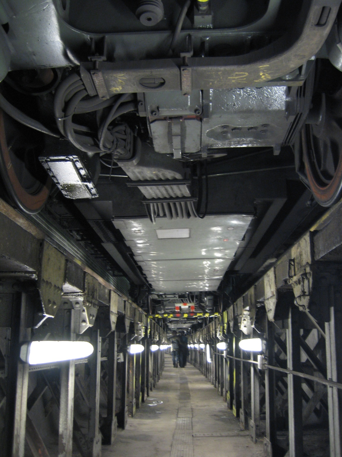 Journées du patrimoine RATP 16-17/09/2006. Le dessous d'un MF 67 dans une fosse.